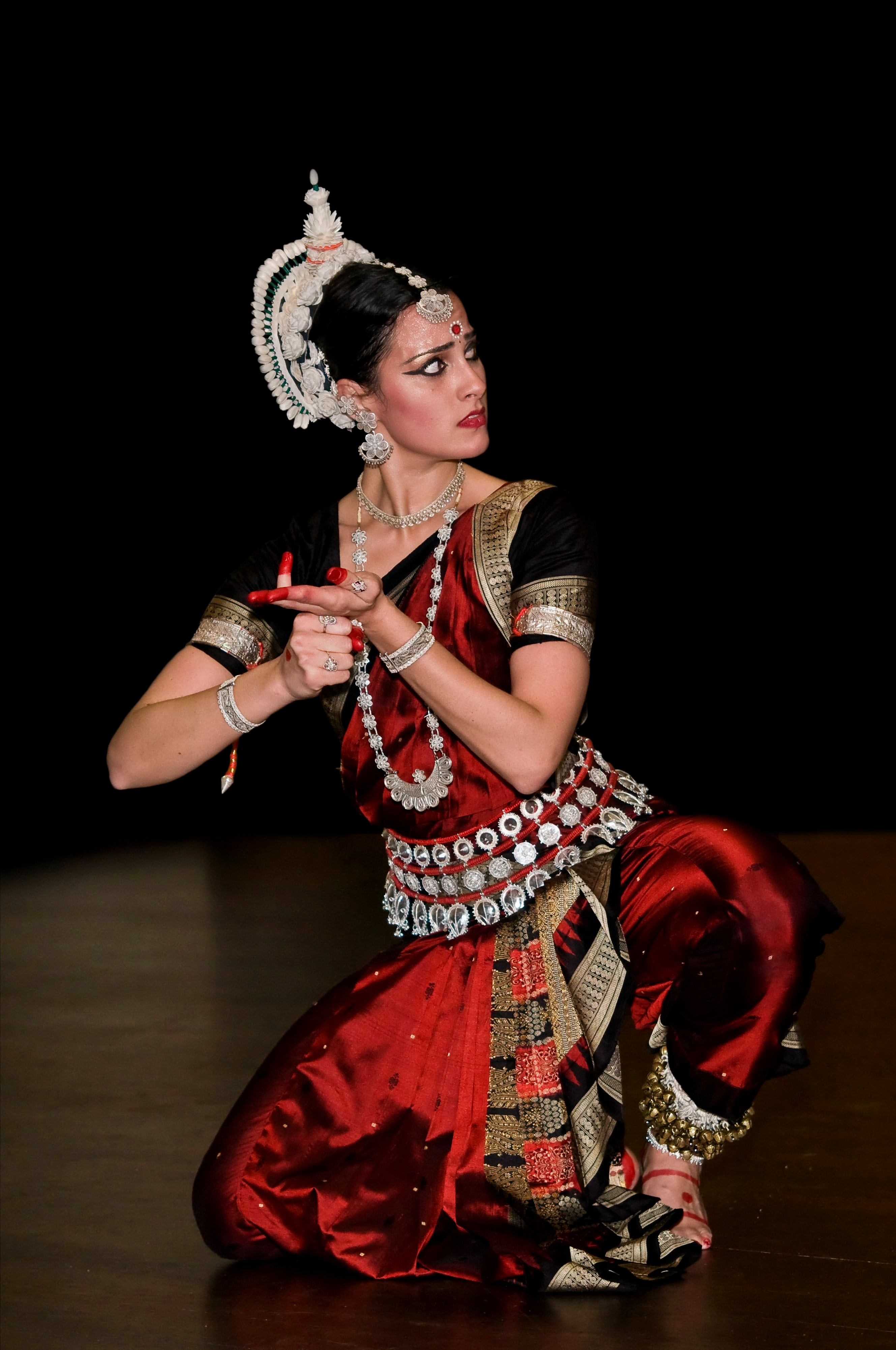 Odissi Dancer Sitara Thobani